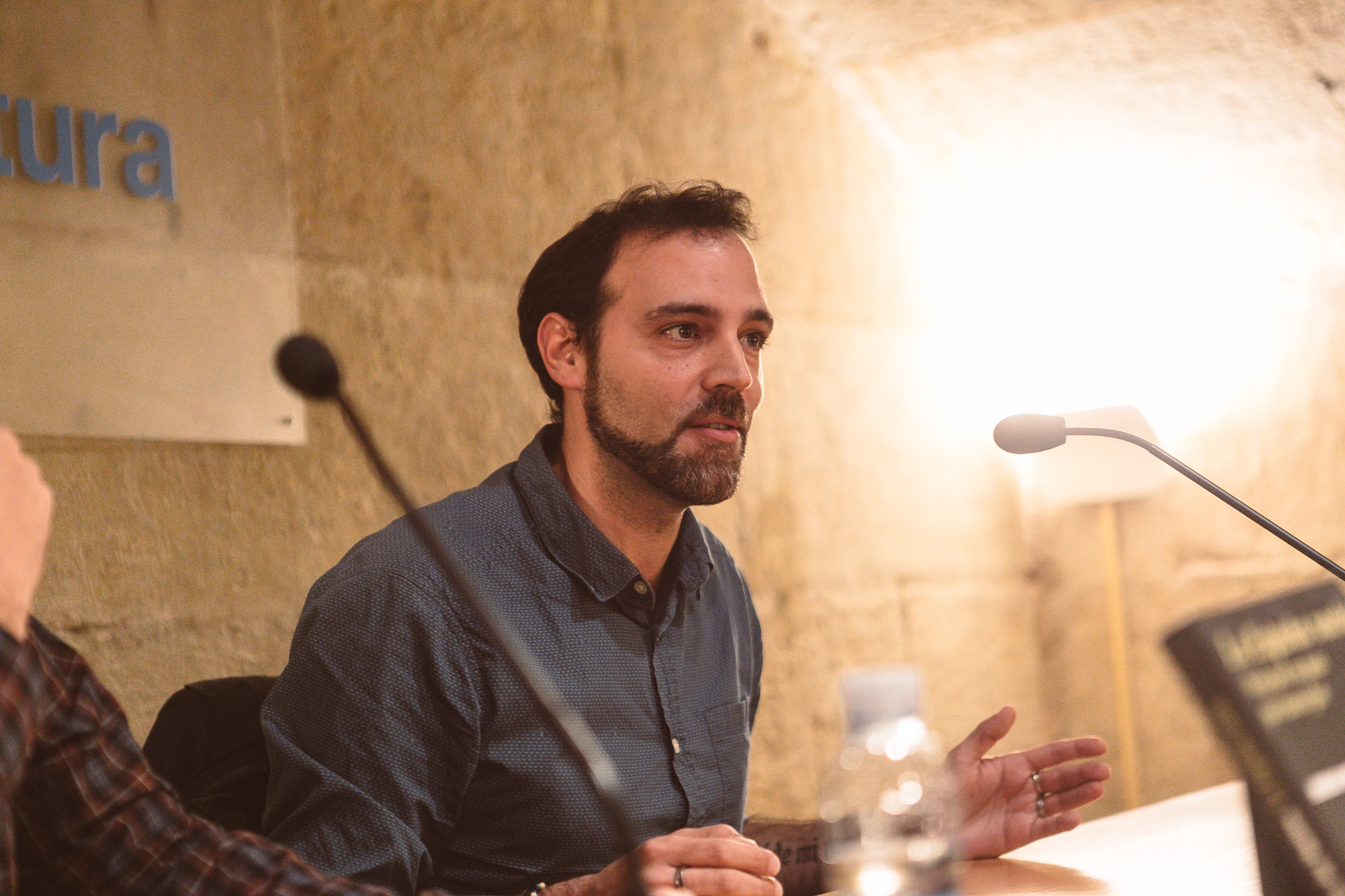 Sergio del Molino & Iván Repila Literaktum 17 Liburutegi Nagusia Argazkilaria/fotógrafa: Lorena Otero